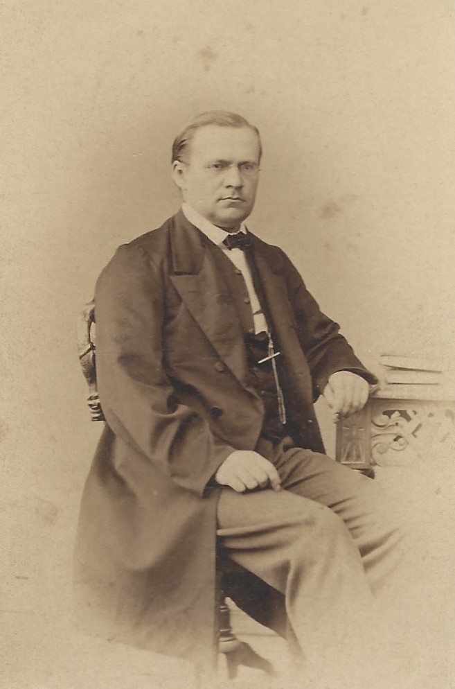 Fotografie von Bernhard Todt